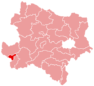 Karte: Waidhofen an der Ybbs